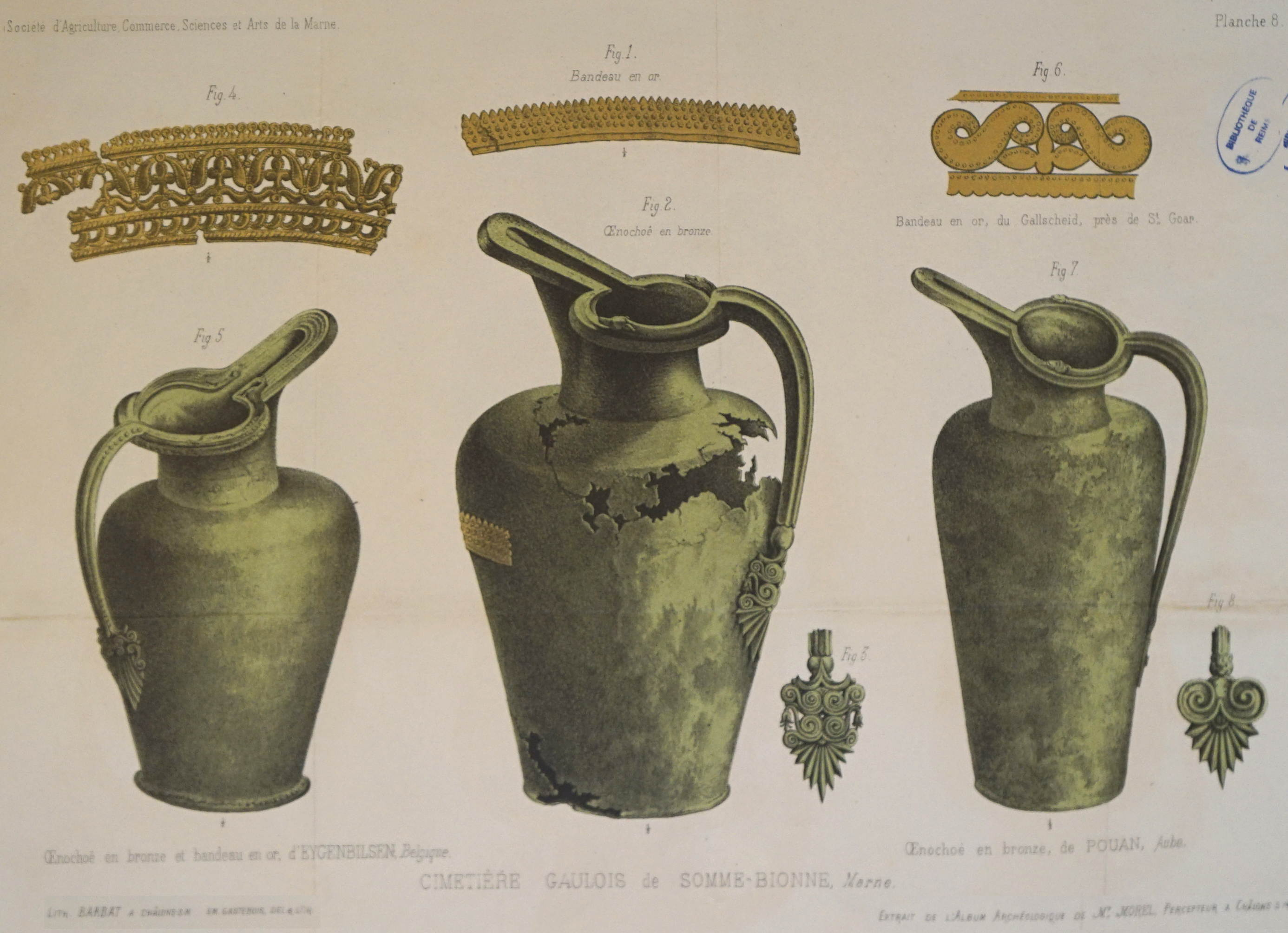 Trois oenochoés à bec de trèfle sur une lithographies de Gastebois pour illustrer des parutions.